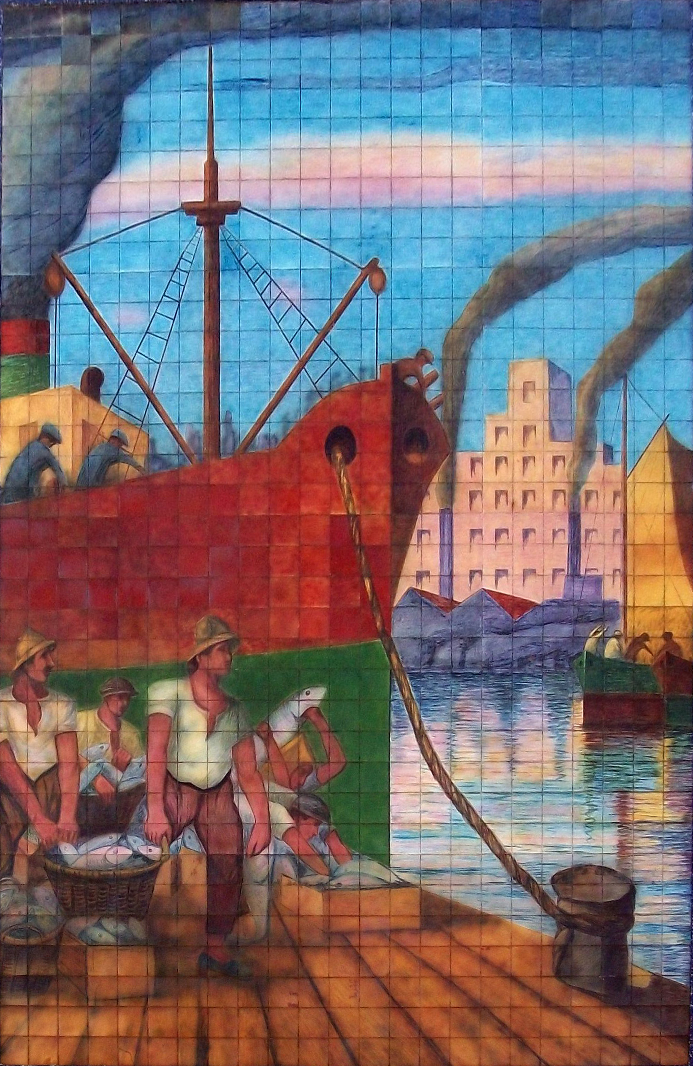 Cuadro Regreso de la pesca pintado por Quinqula, exhibido en un mural en la calle Caminito